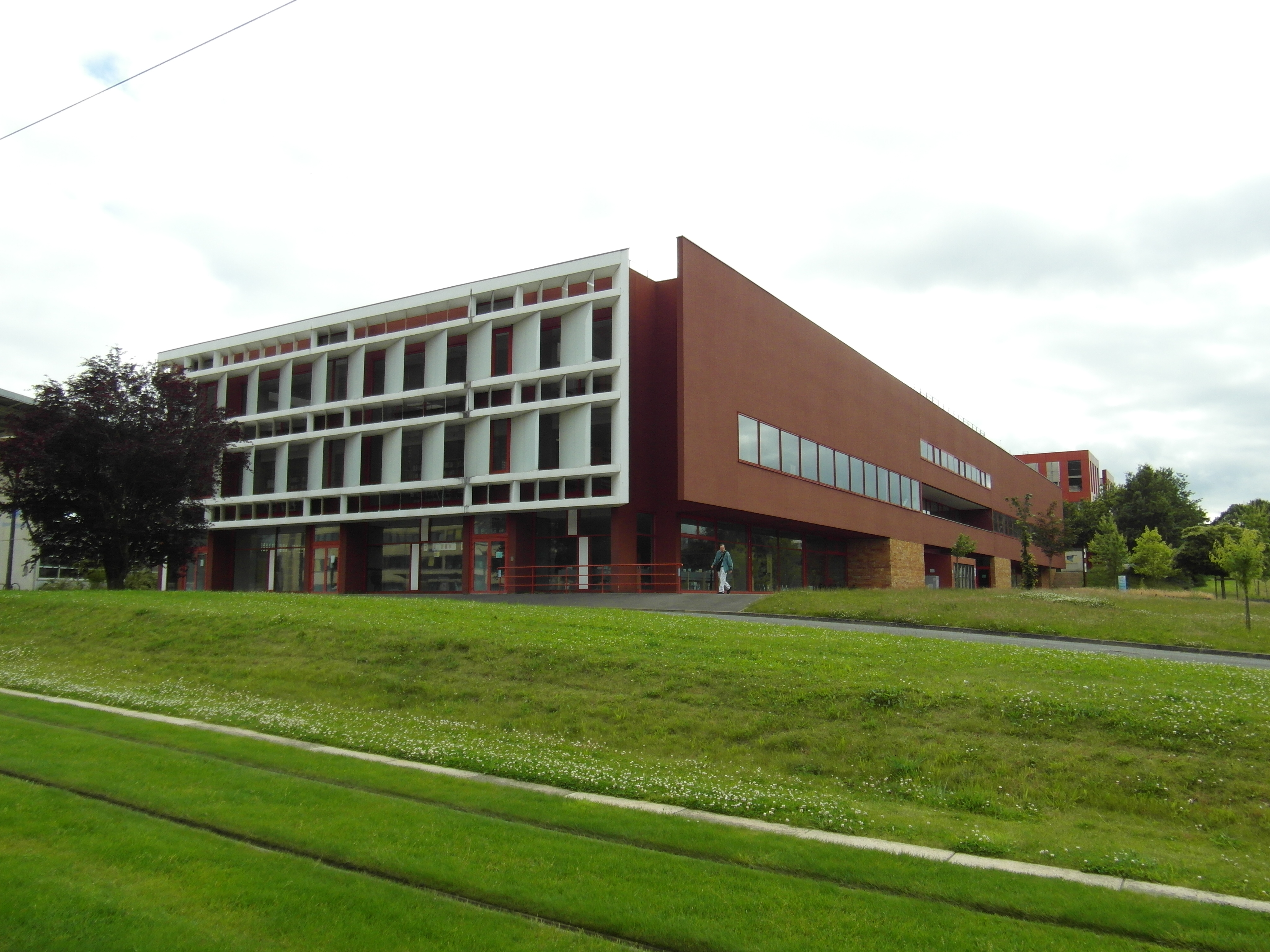 Tramway du Mans